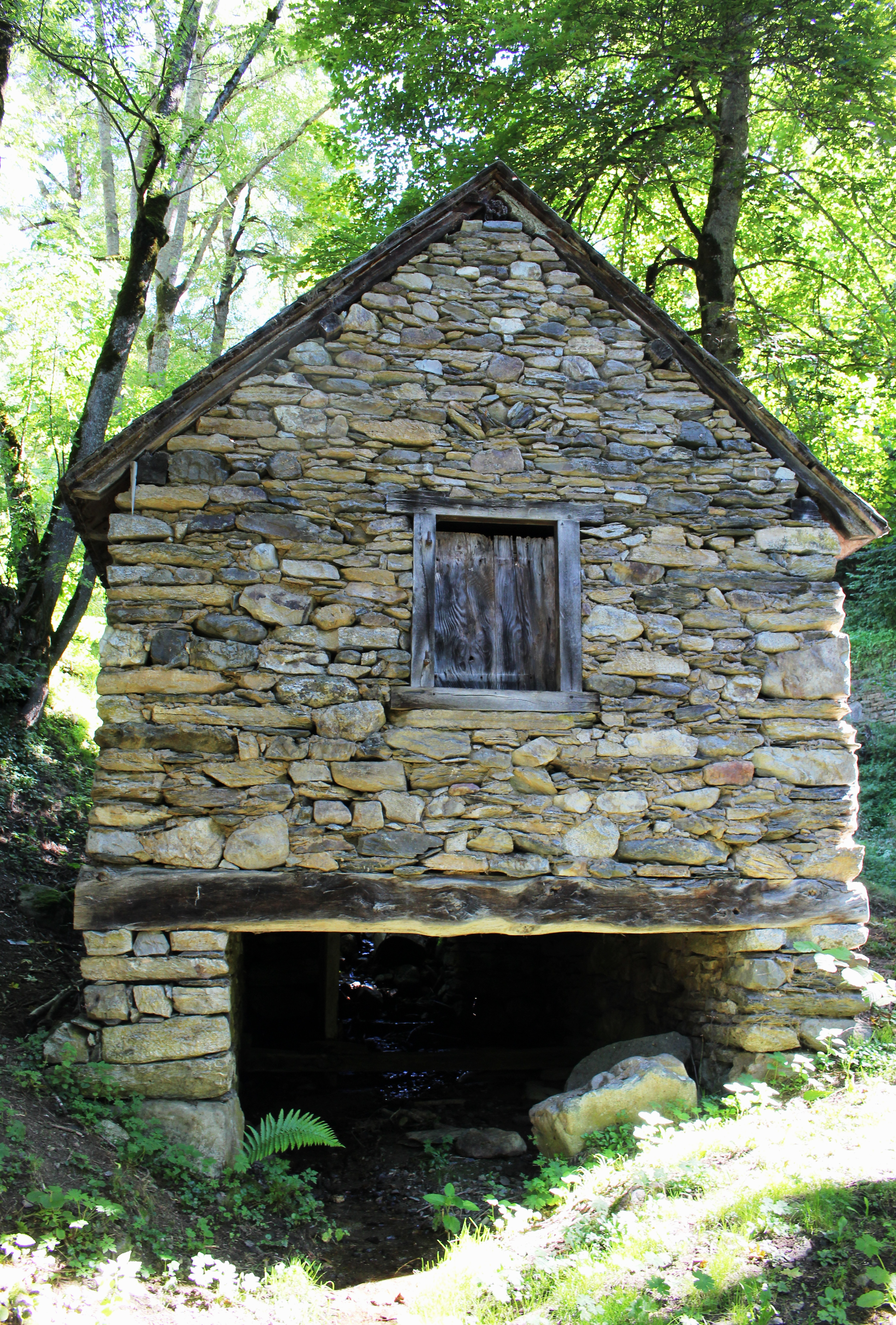 Moulin de Mont (Hautes-Pyrénées)